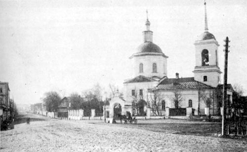 Варварская улица. Нижний Новгород. XIXв.JPG